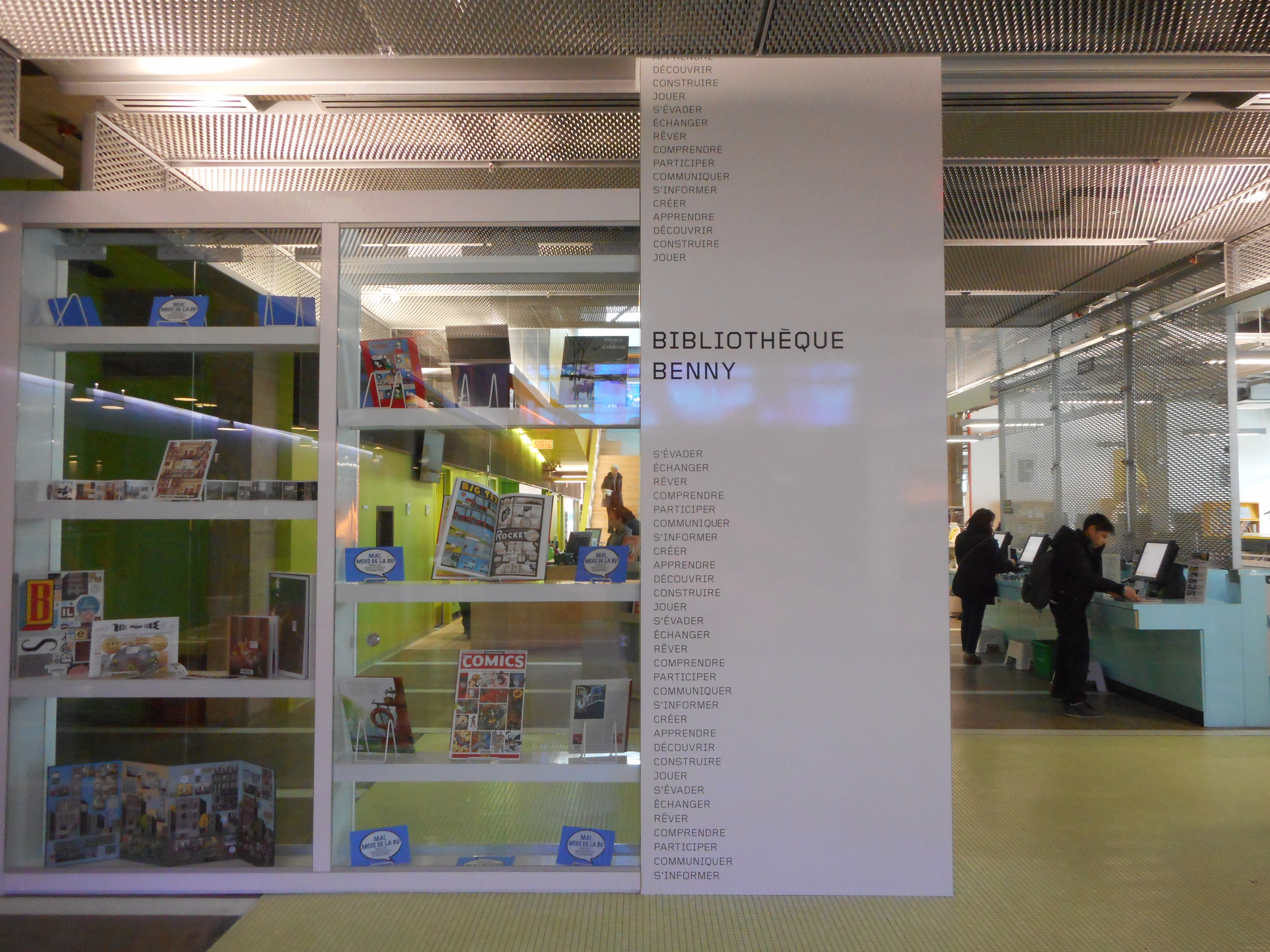 La bibliothèque Benny est une bibliothèque de Montréal située dans le quartier de Notre-Dame-de-Grâce. Depuis 2016, elle loge dans le Centre culturel de Notre-Dame-de-Grâce, 6400, avenue de Monkland.